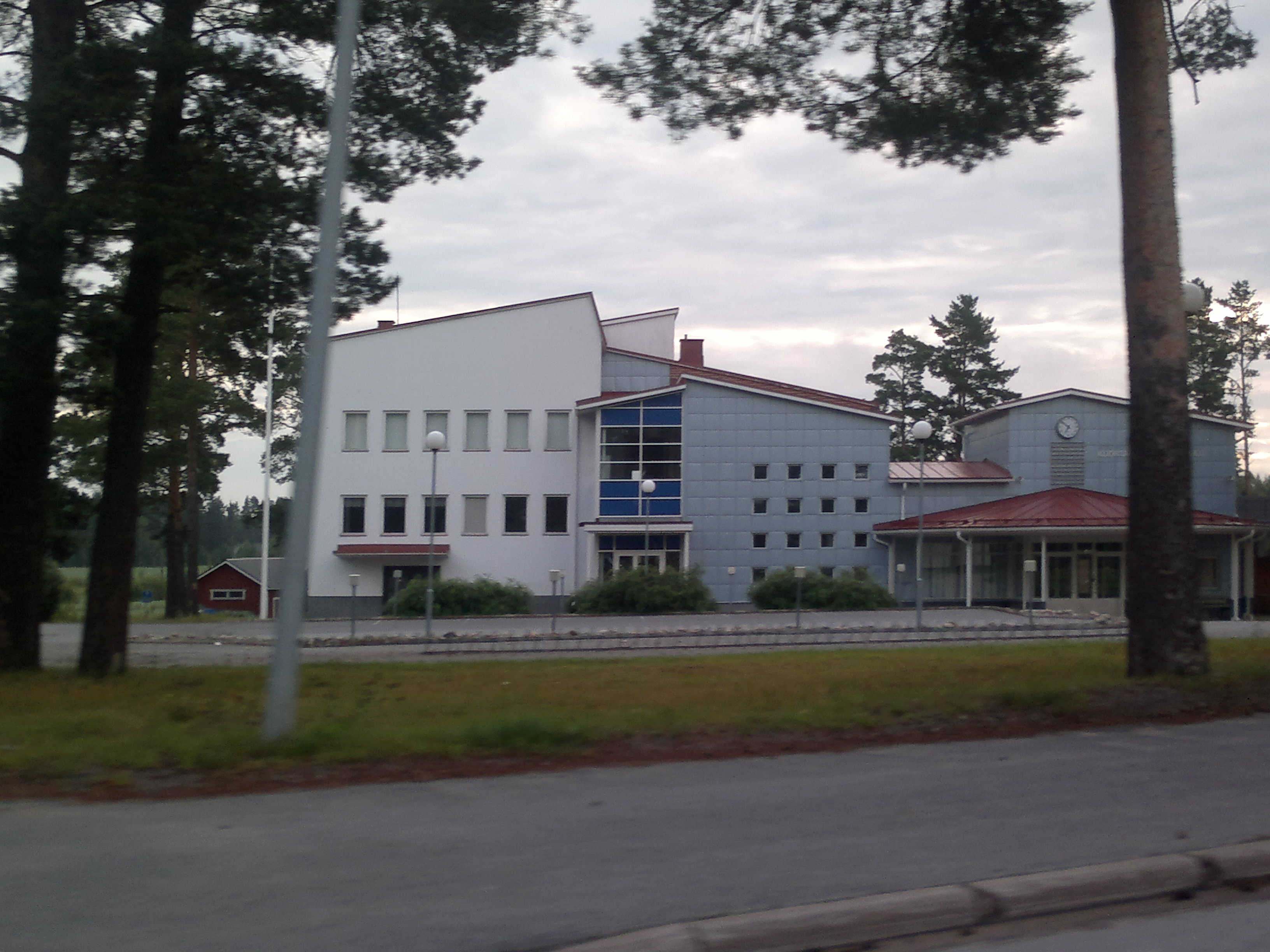 Kuortaneen yhteiskoulu vuonna 2012.